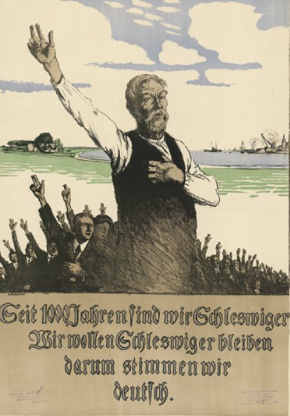 Afstemningsplakat fra 1920